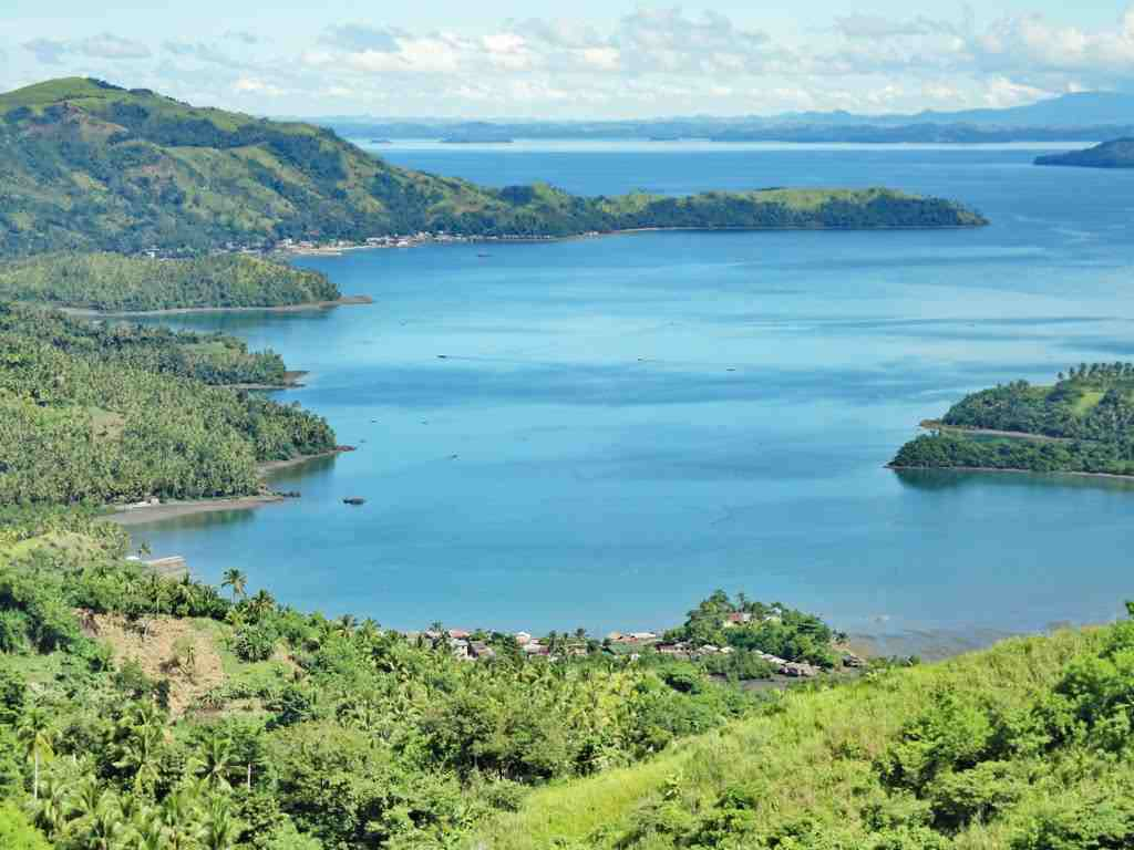 Talalora view